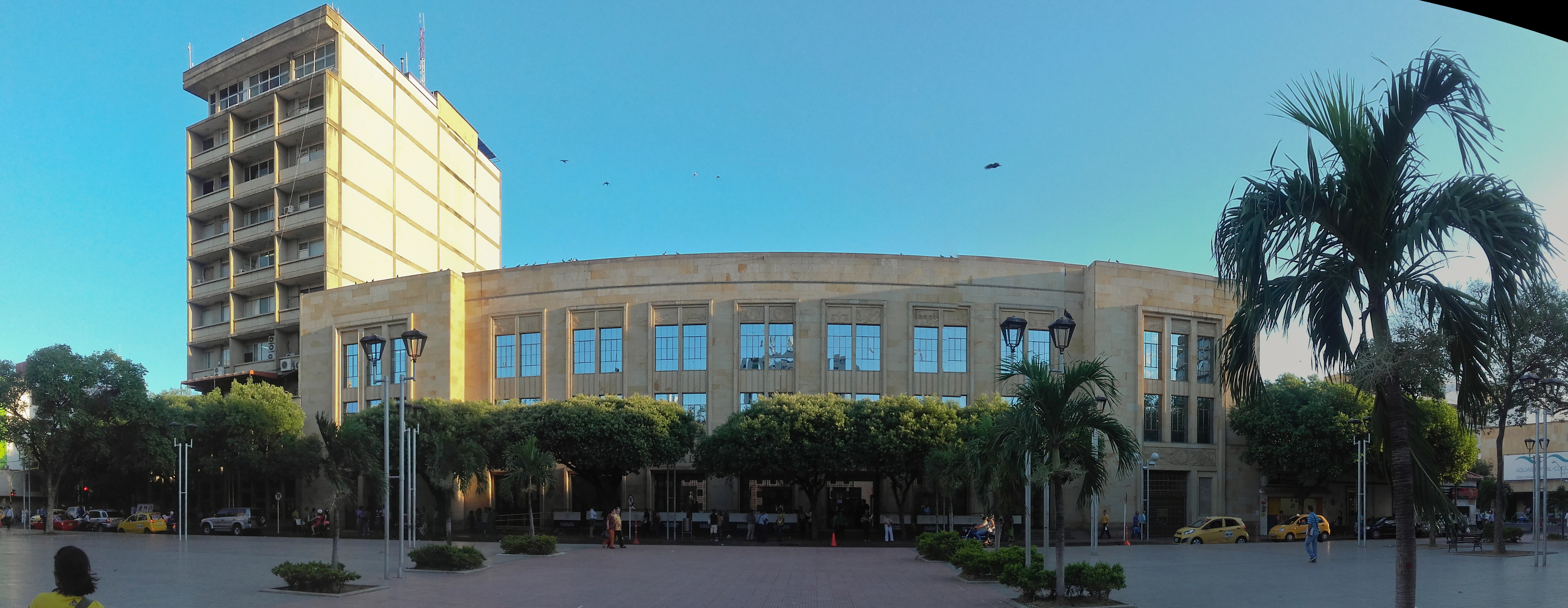 Alcaldía municipal de Cúcuta NS, Col